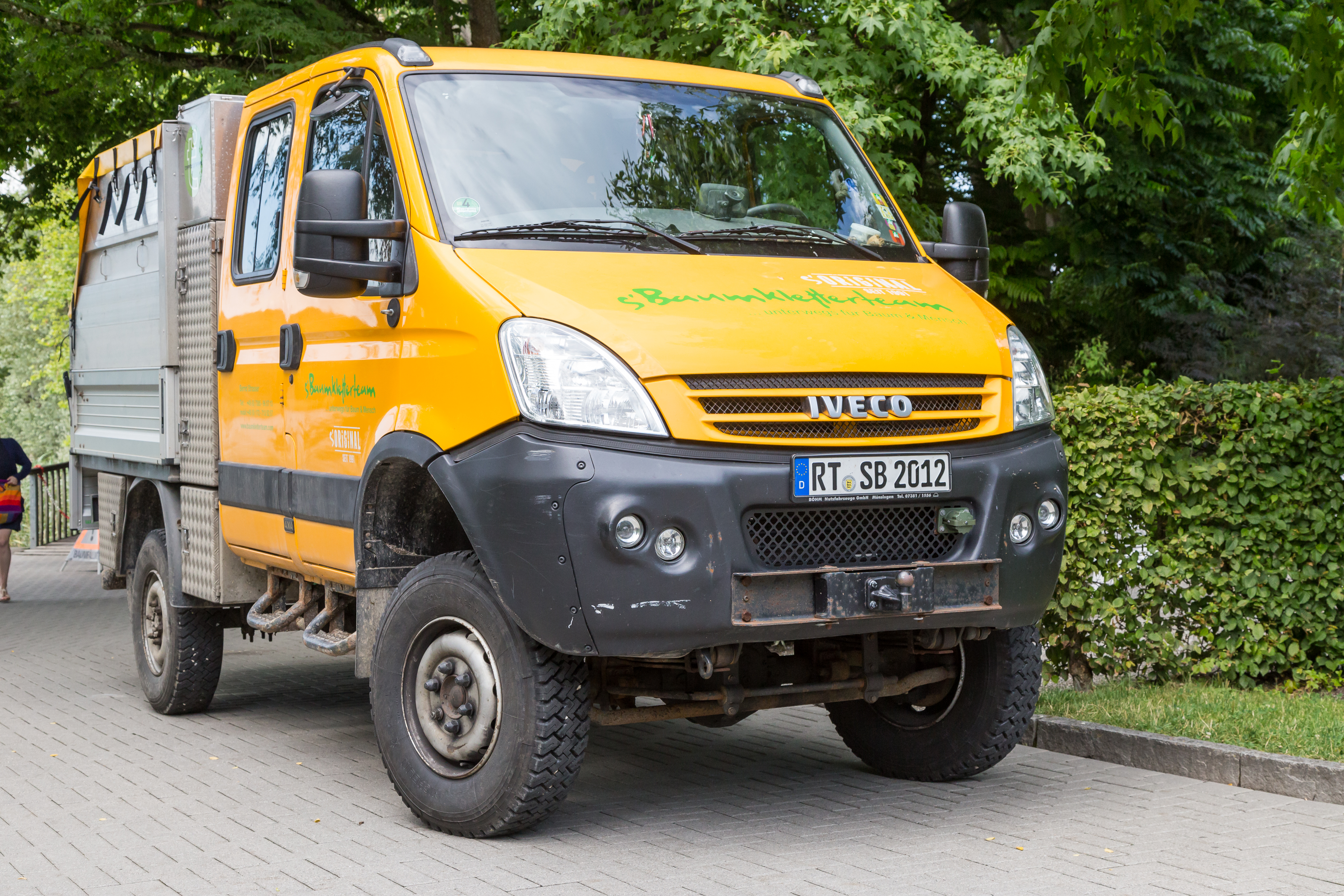 Iveco Daily 4x4 der Firma "s'Baumkletterteam" auf der Mainau